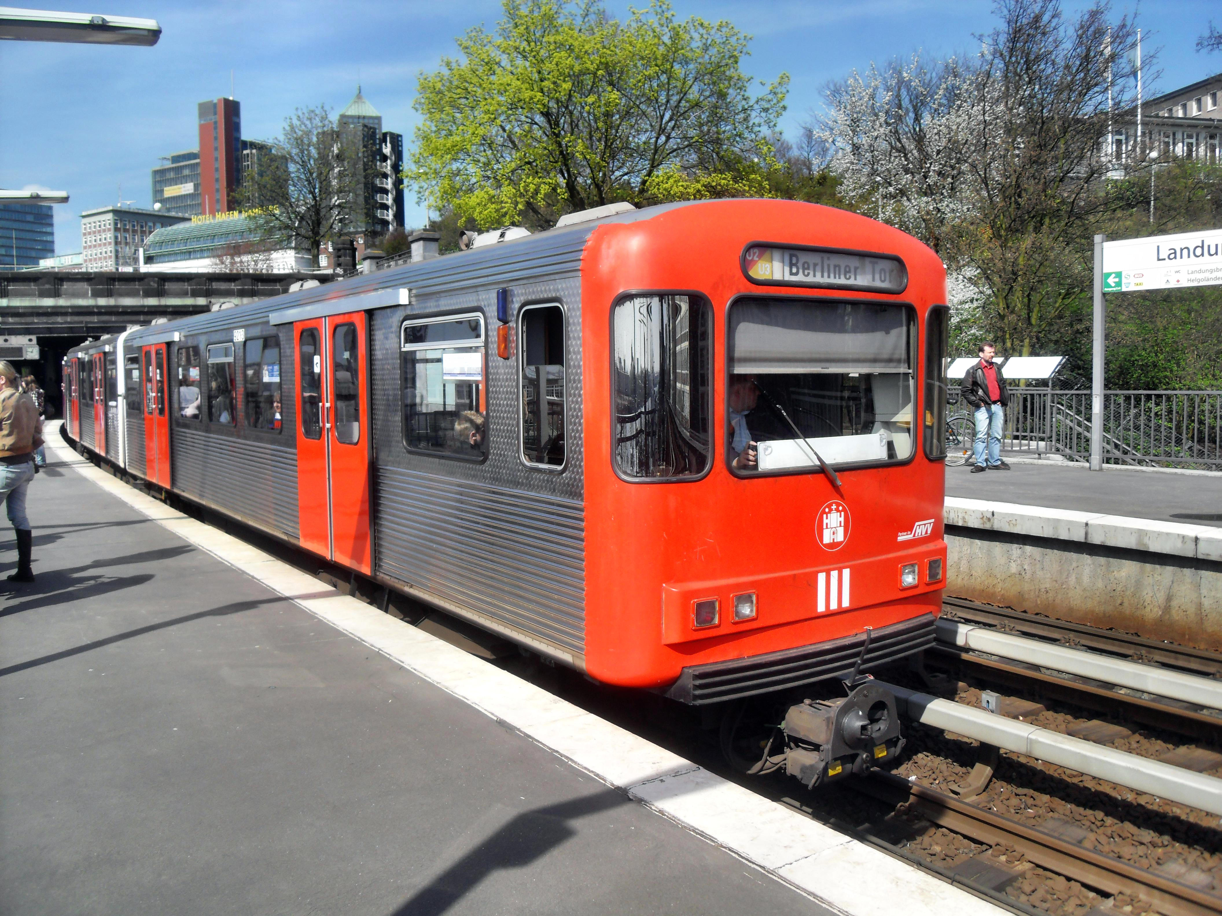 U-Bahn der Hamburger Hochbahn im U-Bahnhof Landungsbrücken auf der Linie U2/U3 auf dem Weg nach Berliner Tor